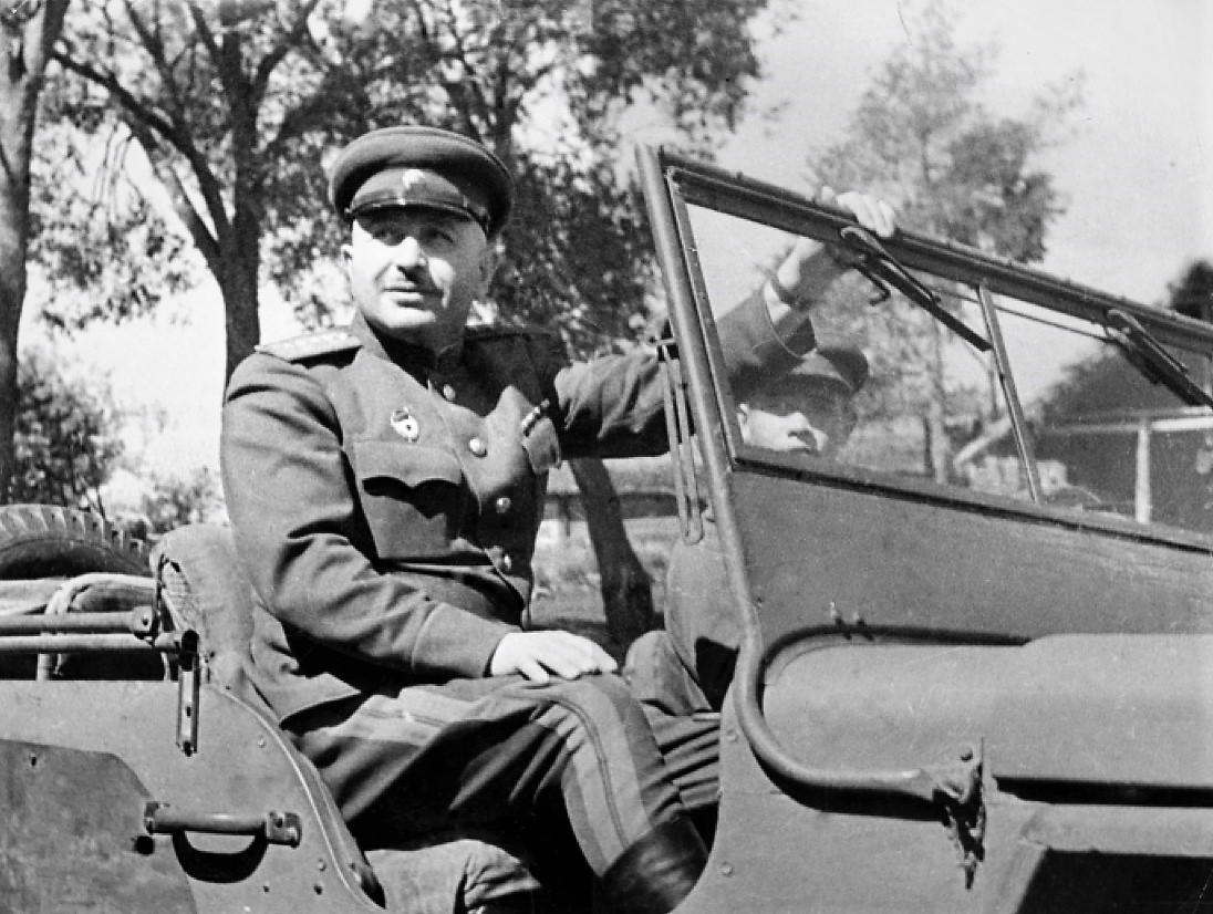 Командующий 1-м Прибалтийским фронтом генерал армии И.Х. Баграмян